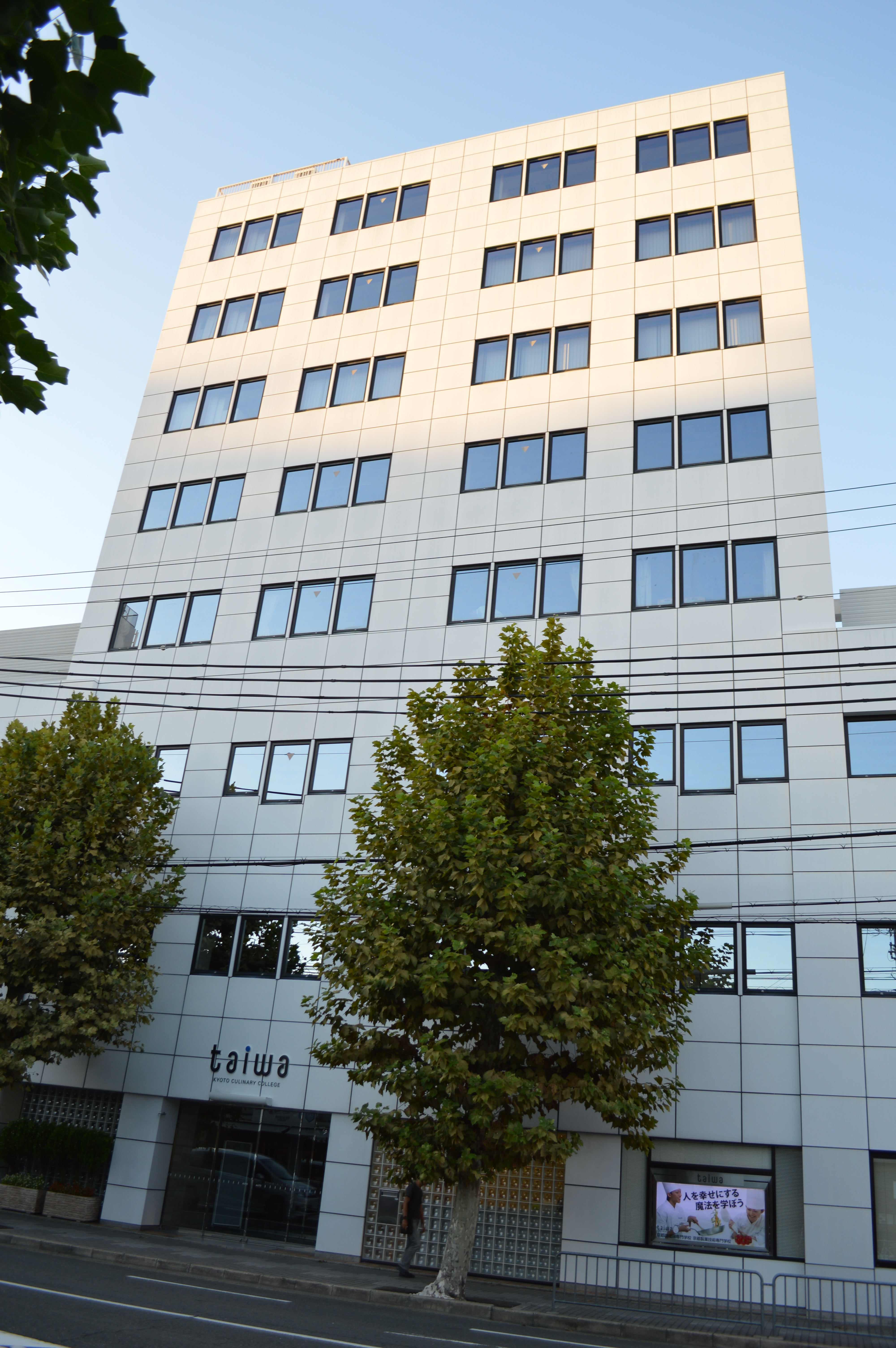 京都市中京区四条千本角にある京都調理師専門学校